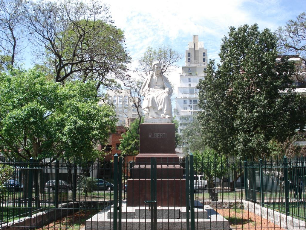 Monumento a Manuel Máximo Alberti (Lucio Correa Morales, 1910), en Plaza Albeti, Belgrano, Ciudad de Buenos Aires, Argentina.